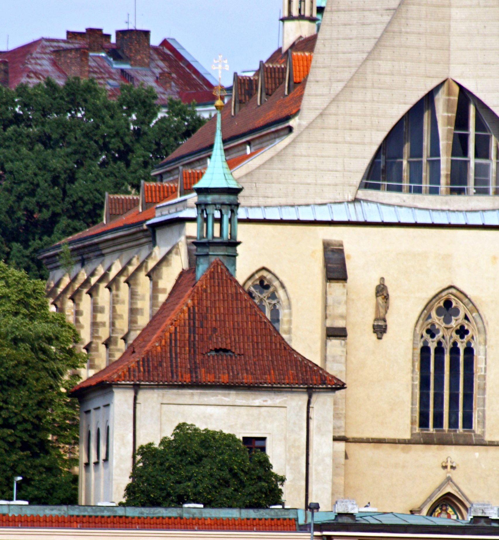 Chrám svatých Kosmy a Damiána v Emauzském klášteře, Praha